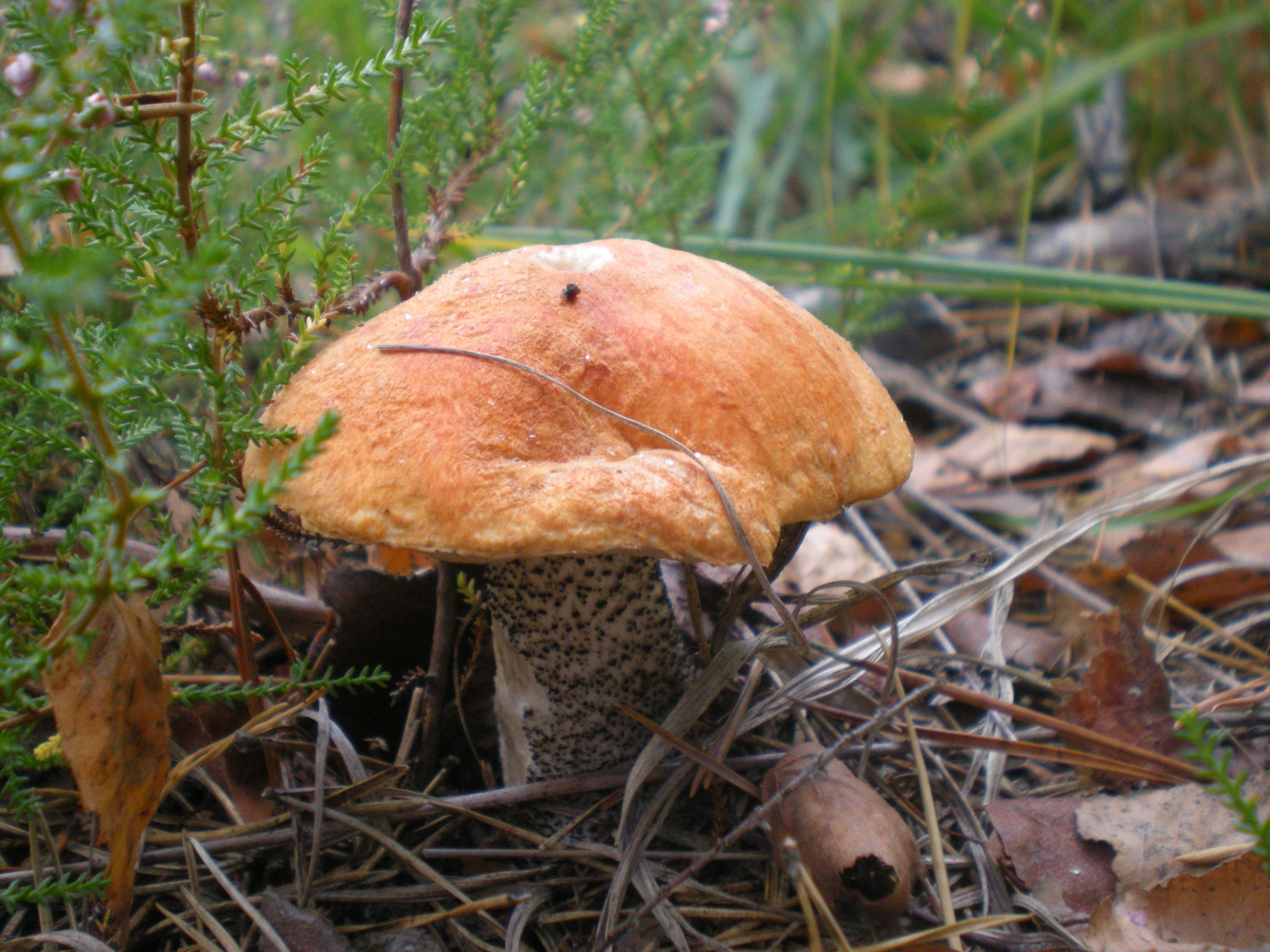 Koźlarz pomarańczowy, koźlarz pomarańczowożółty (Leccinum versipelle), Wólka Łękawska, Polska, 51°18'24"N, 19°23'34"E (51.3065, 19.3928)